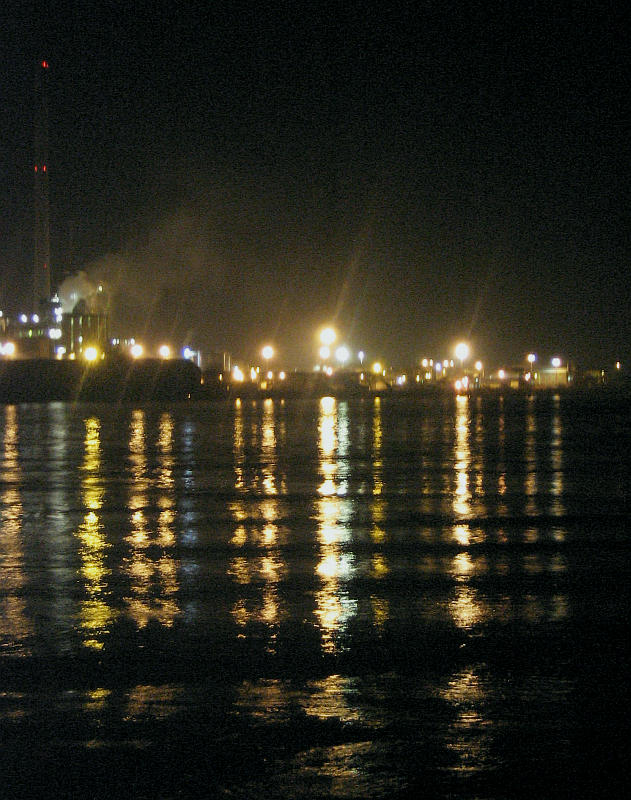 Umicore-plant in Hoboken, België gezien vanaf de linkeroever.